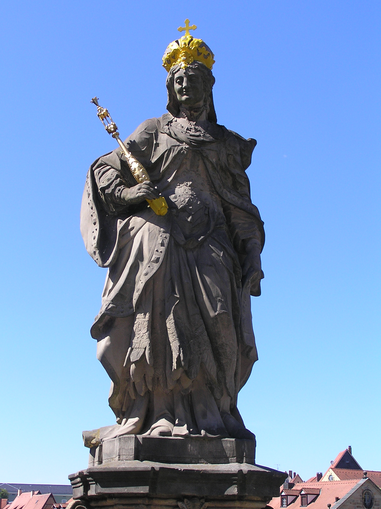 Statue der Kaiserin Kunigunde auf der Unteren Brücke in Bamberg